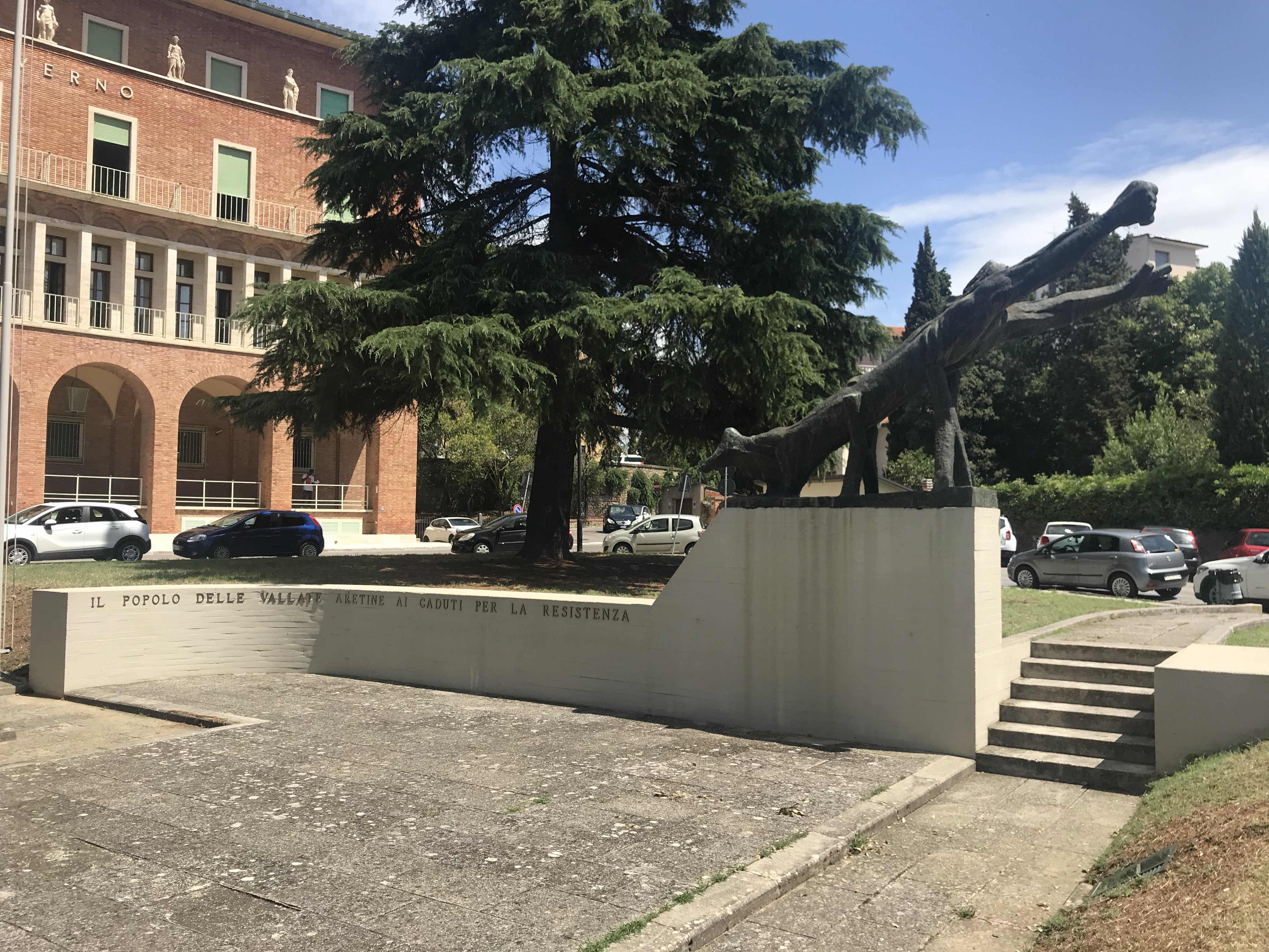 Palazzo del governo di Arezzo